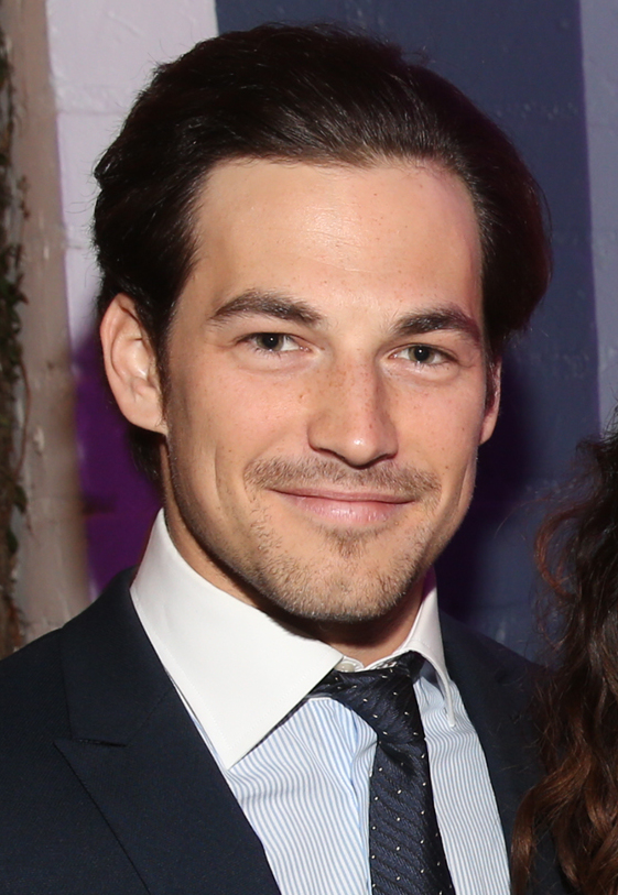 en 2016